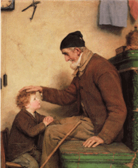 Der Grossvater segnet seinen Enkel, 1910. Öl auf Leinwand, 65 x 53 cm. Kunstmuseum Olten, Inv. 1961.8